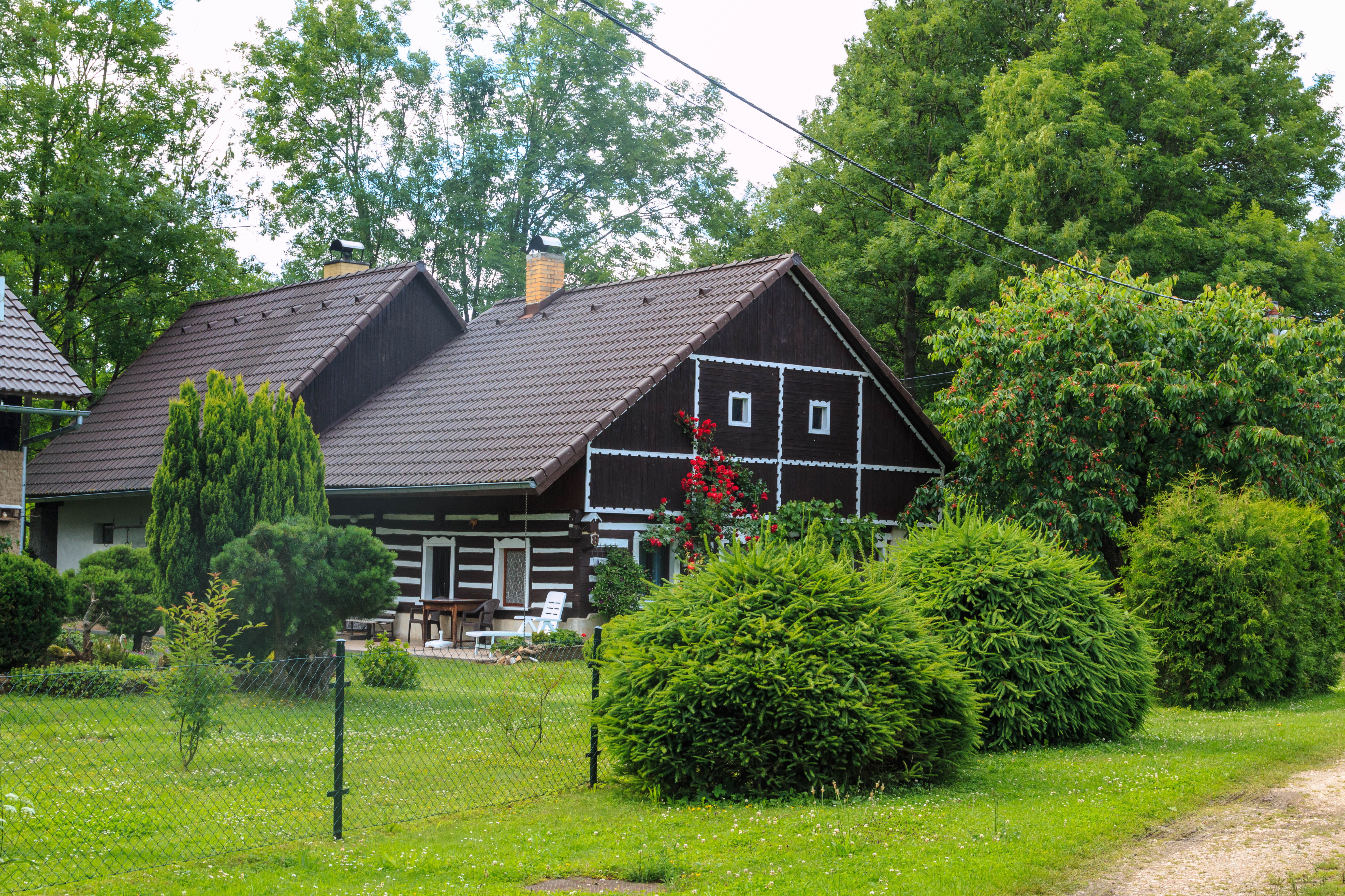 Řeheč čp. 8